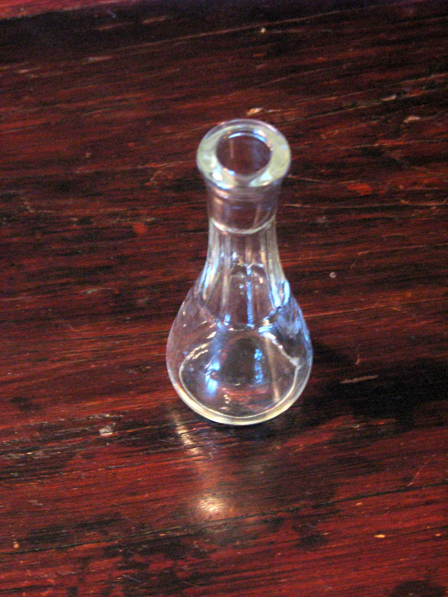 Frakel Autor: Janez Novak, Ljubljana, Slovenija Fotografirt am 2006-05-01